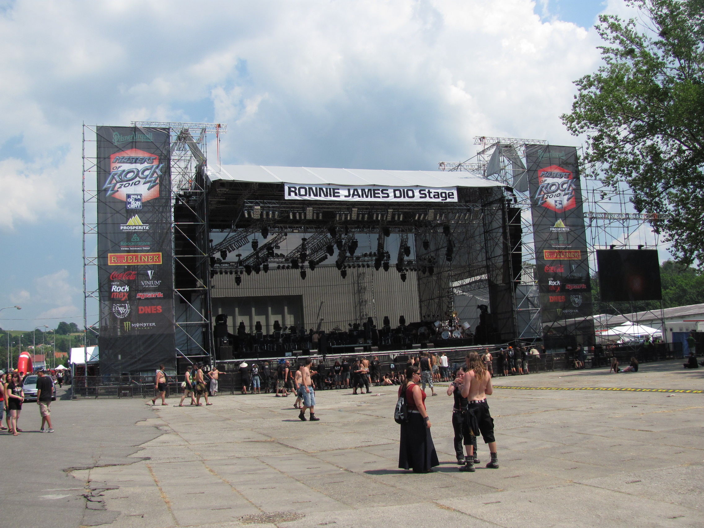 Ronnie James Dio stage, Masters of Rock 2010